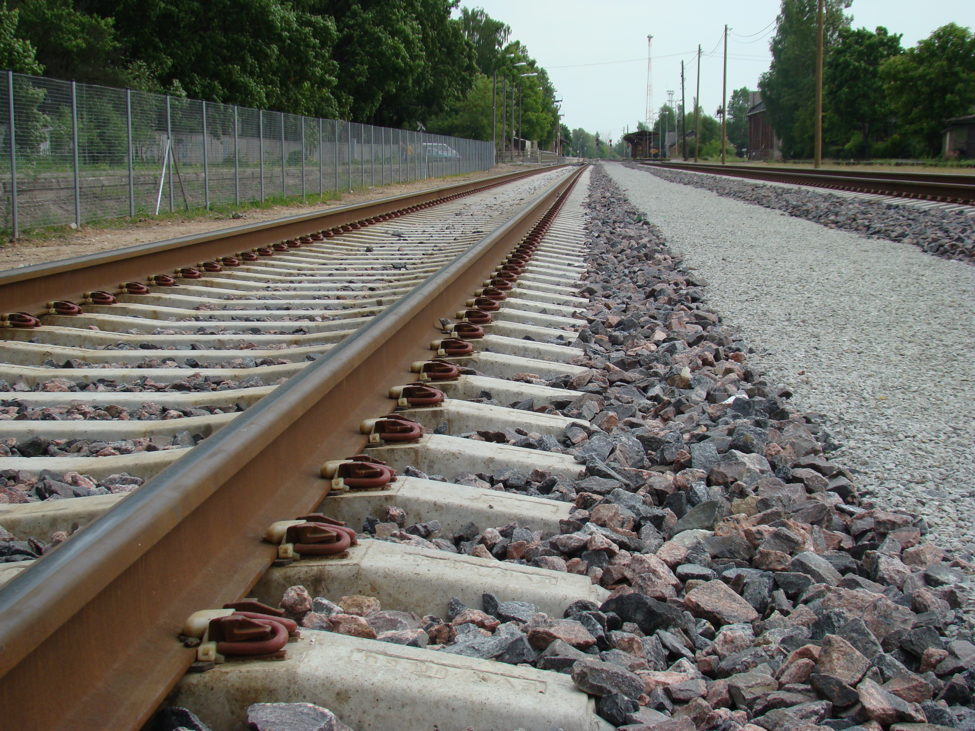 Железнодорожный путь со скреплением Пандрол - 350 (PANDROL FASTCLIP). Станция Тарту, Эстония.